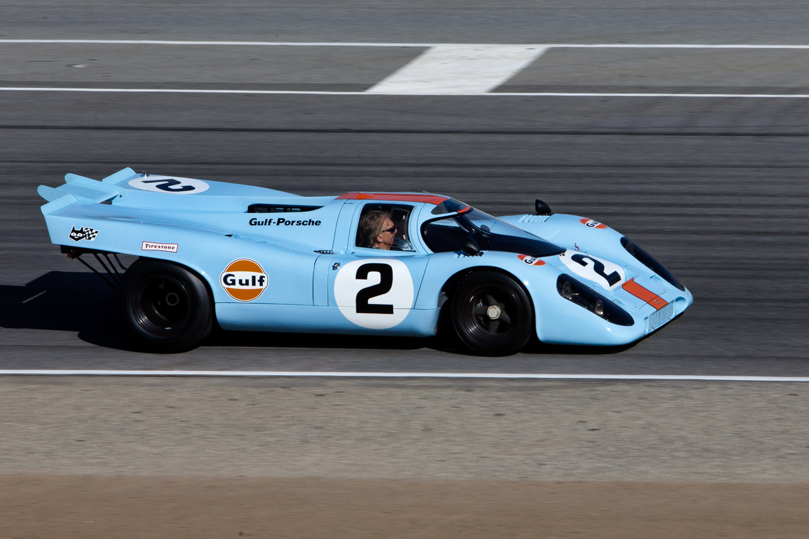 Porsche Rennsport Reunion IV